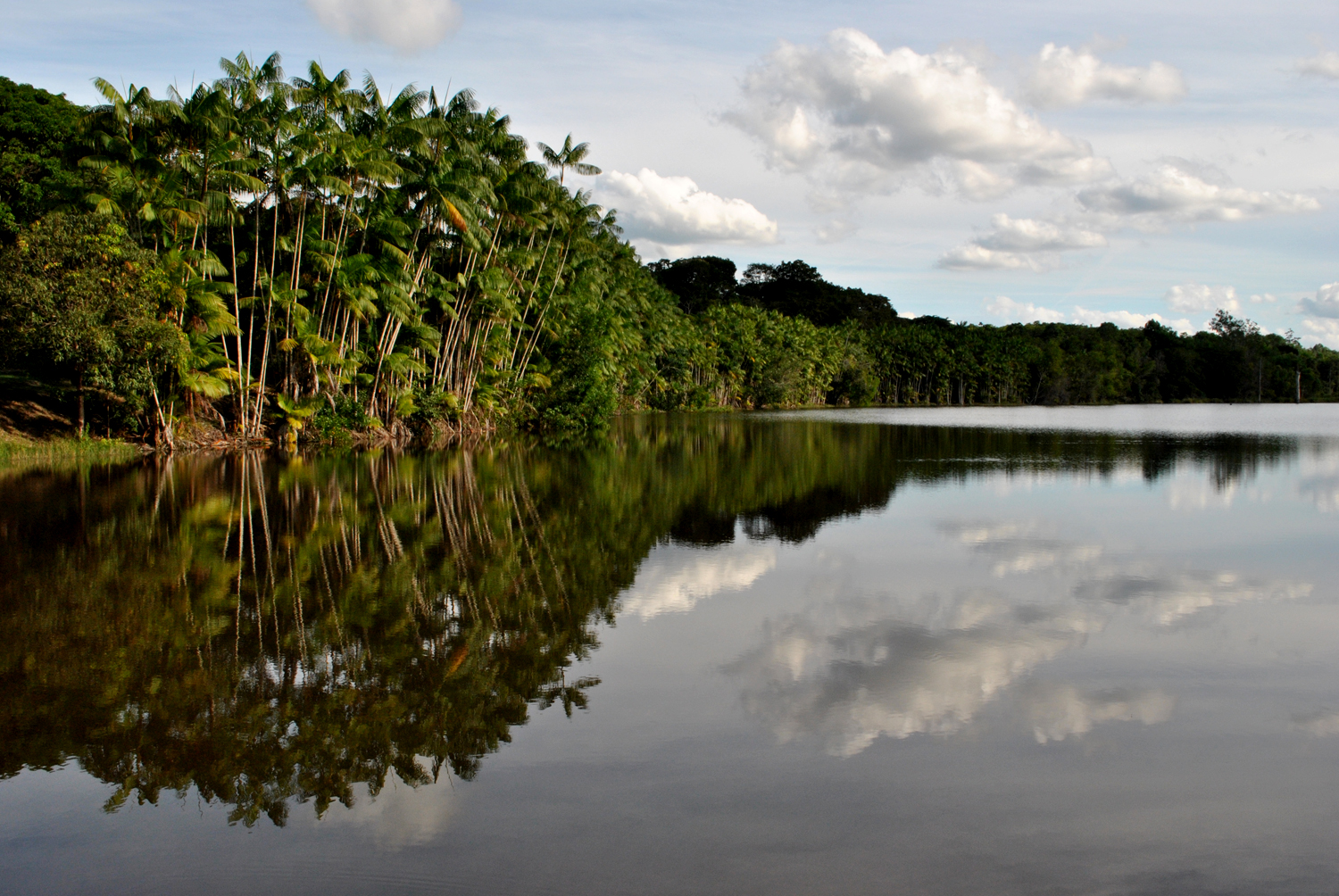 Reserva natural em Sooretama, município de Linhares, ES, Brasil.